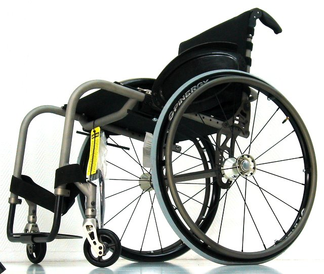 Sopur Titanium - Sunrise Medical